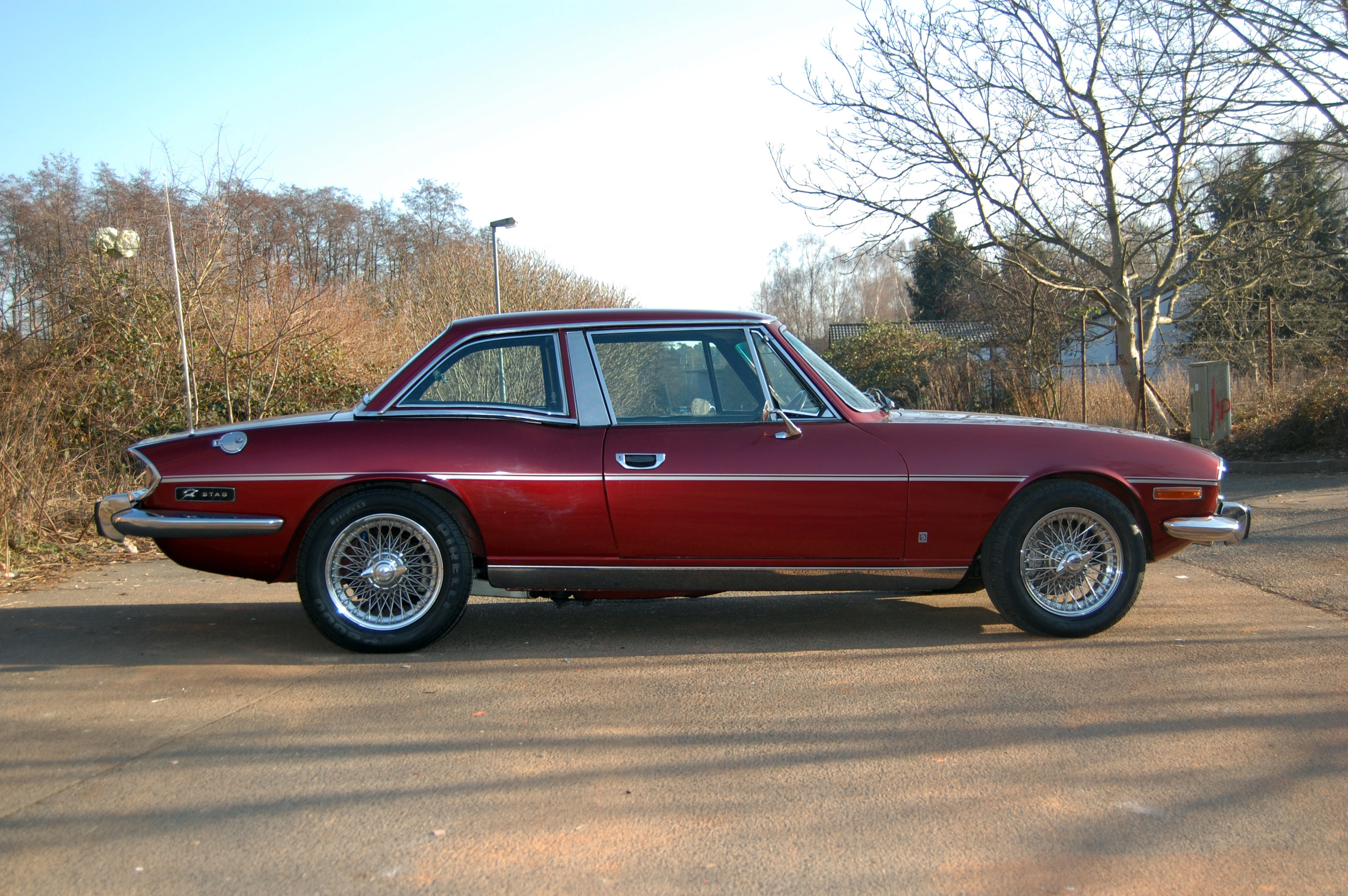 Triumph STAG Bj. 1973 mit Hardtop